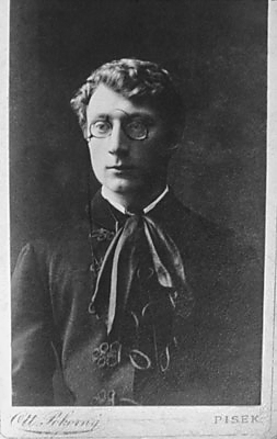 Antonín Sova jako maturant píseckého gymnázia v r. 1885